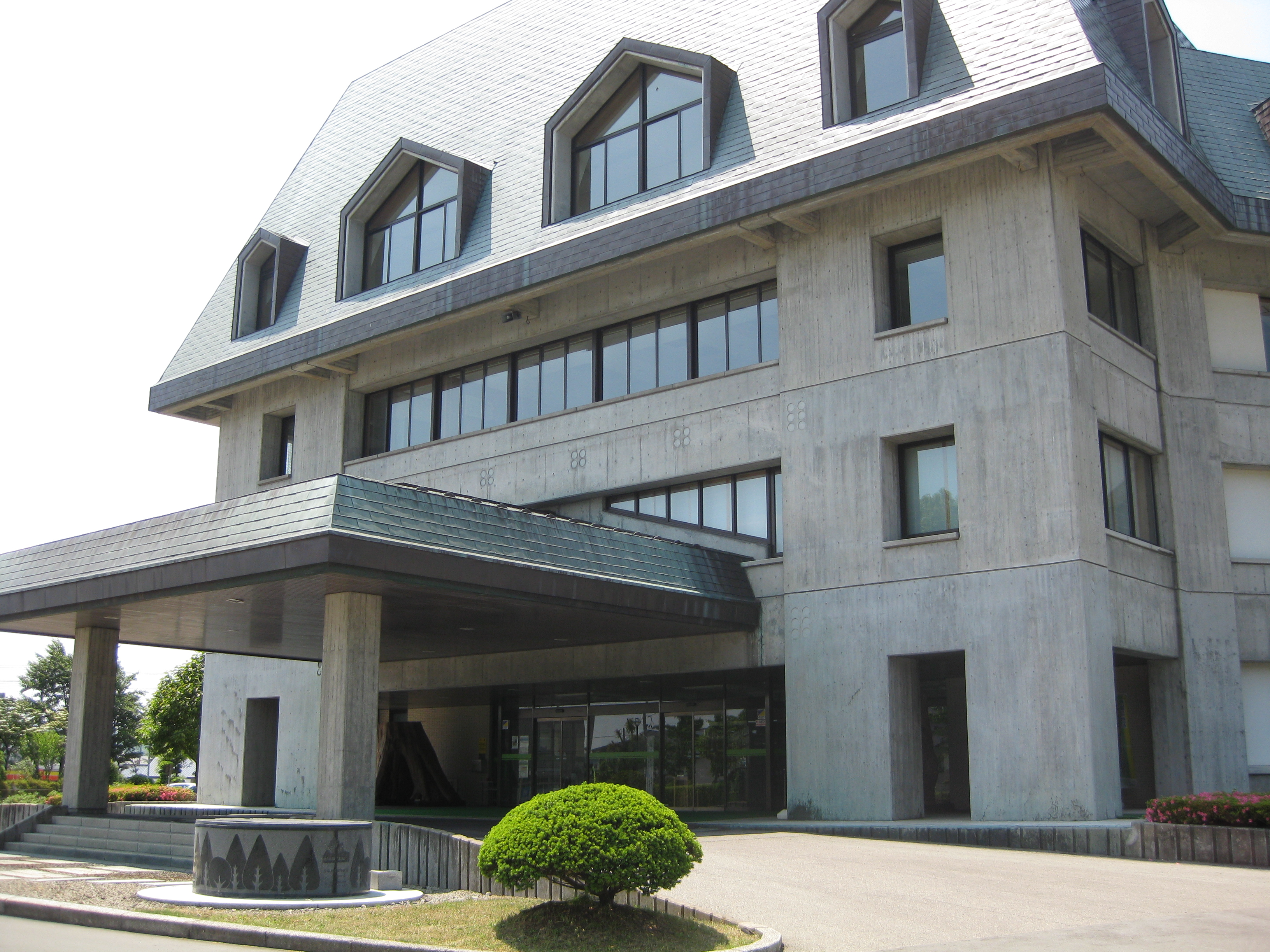 五城目町役場